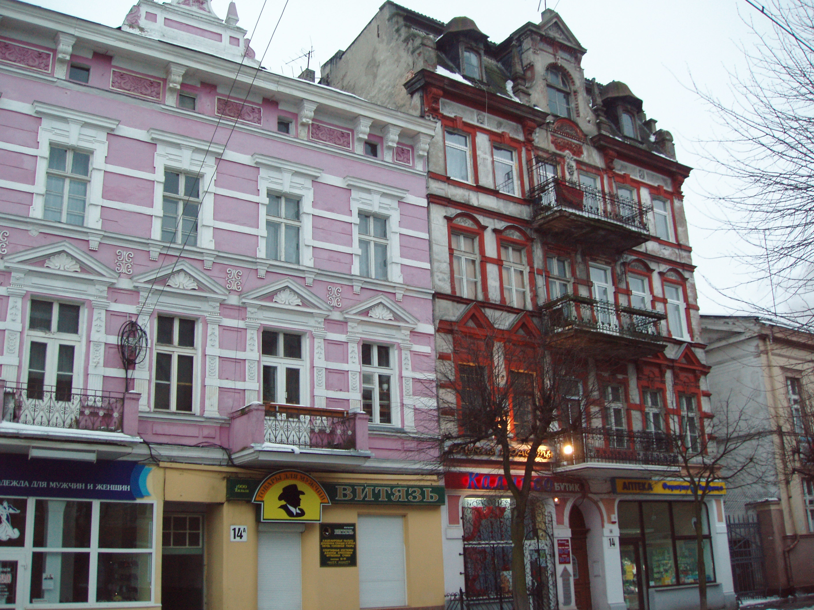 Старые дома в Советске